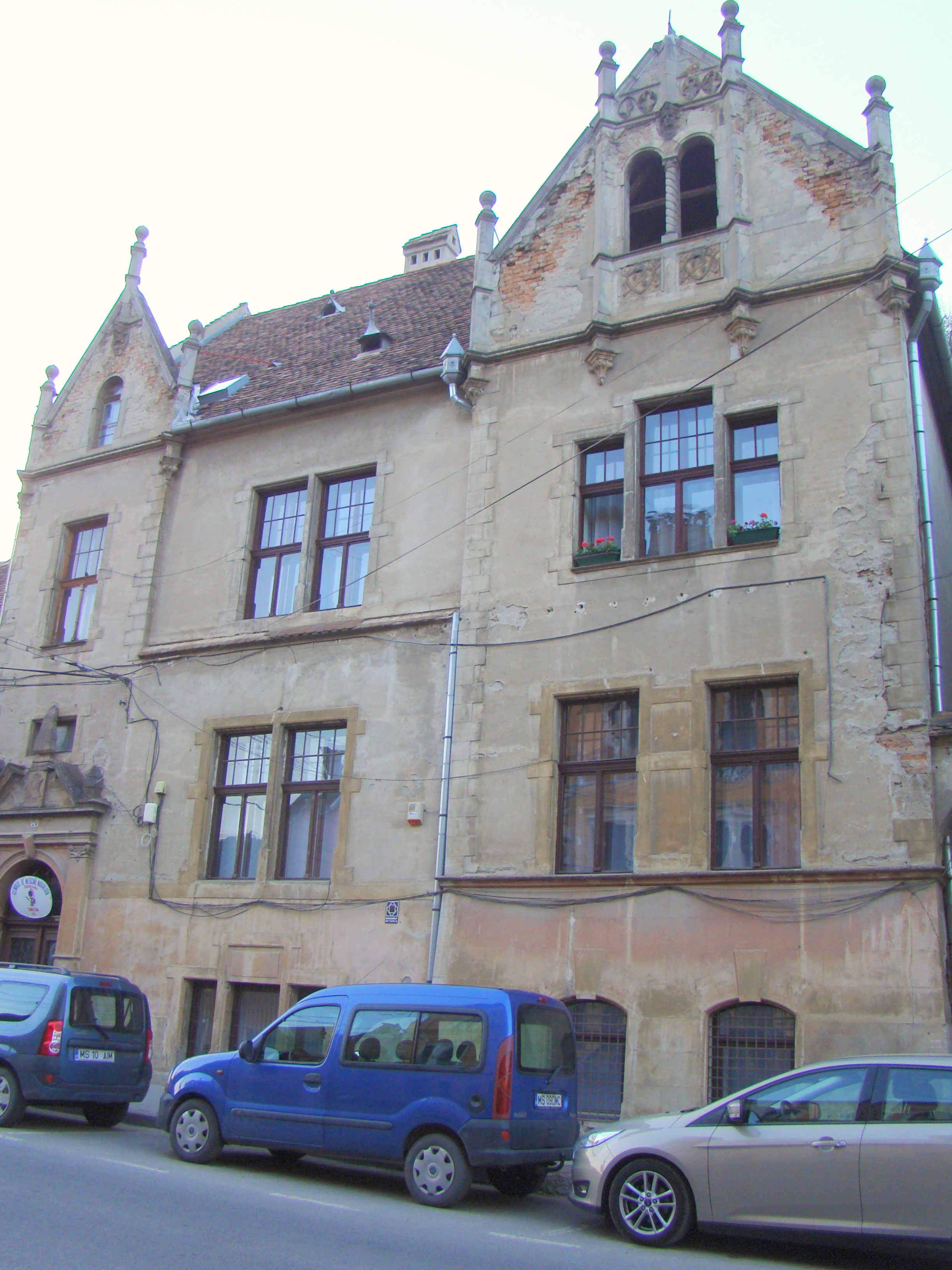 Casă, municipiul Sighișoara, str. Chendi Ilarie 24 sec. XIX